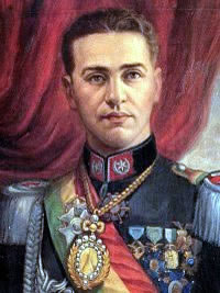 Presidente german busch